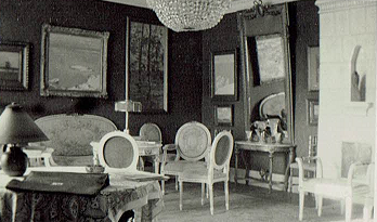 Pääsali